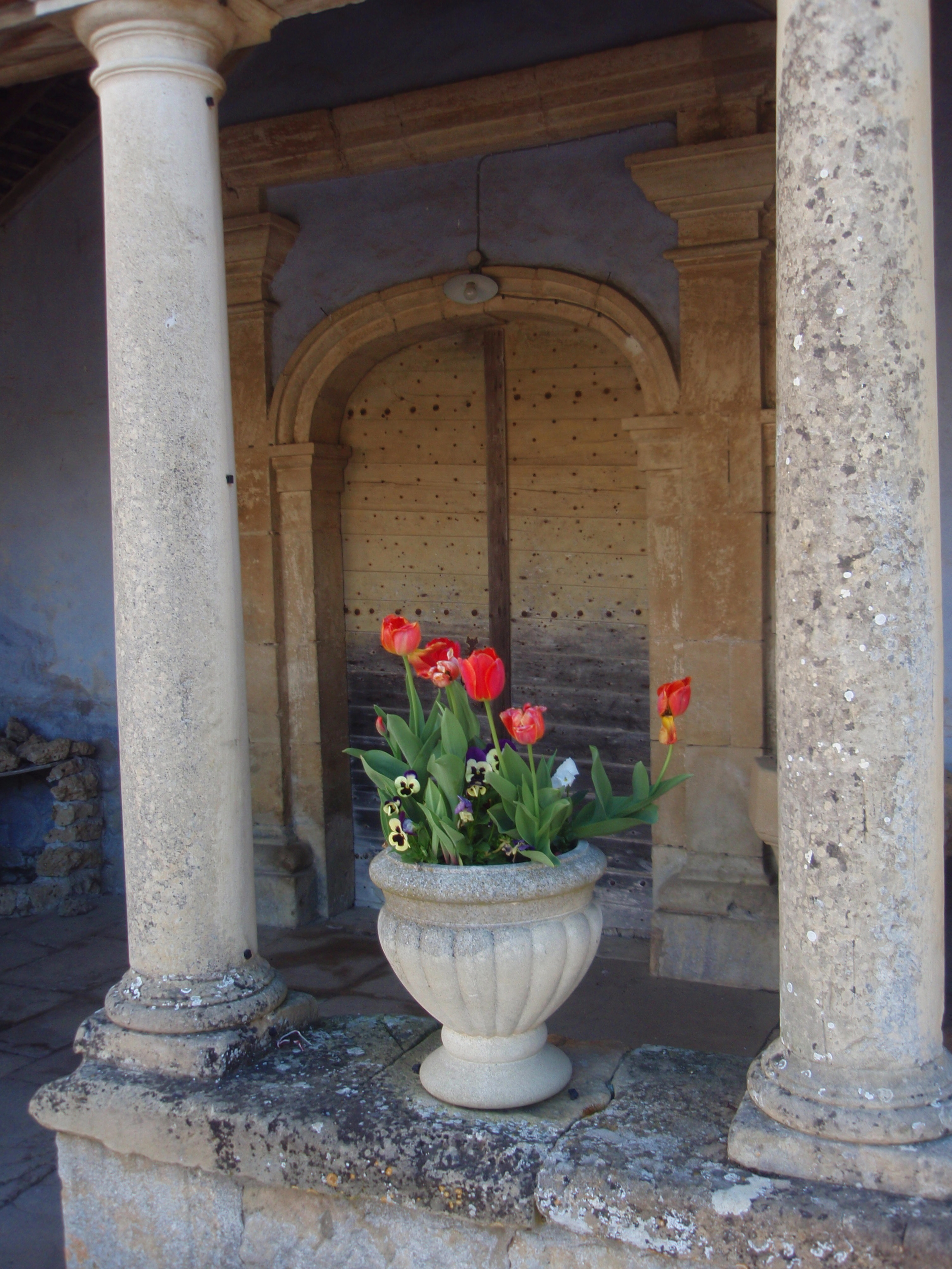 Entrée de l'église de Saint-Benin-des-Bois (Nièvre).